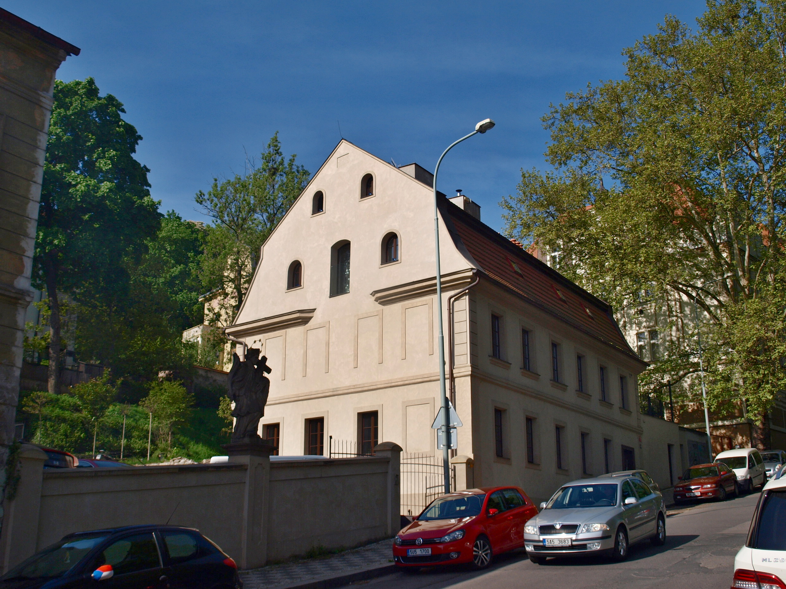 Usedlost Doubková na Smíchově